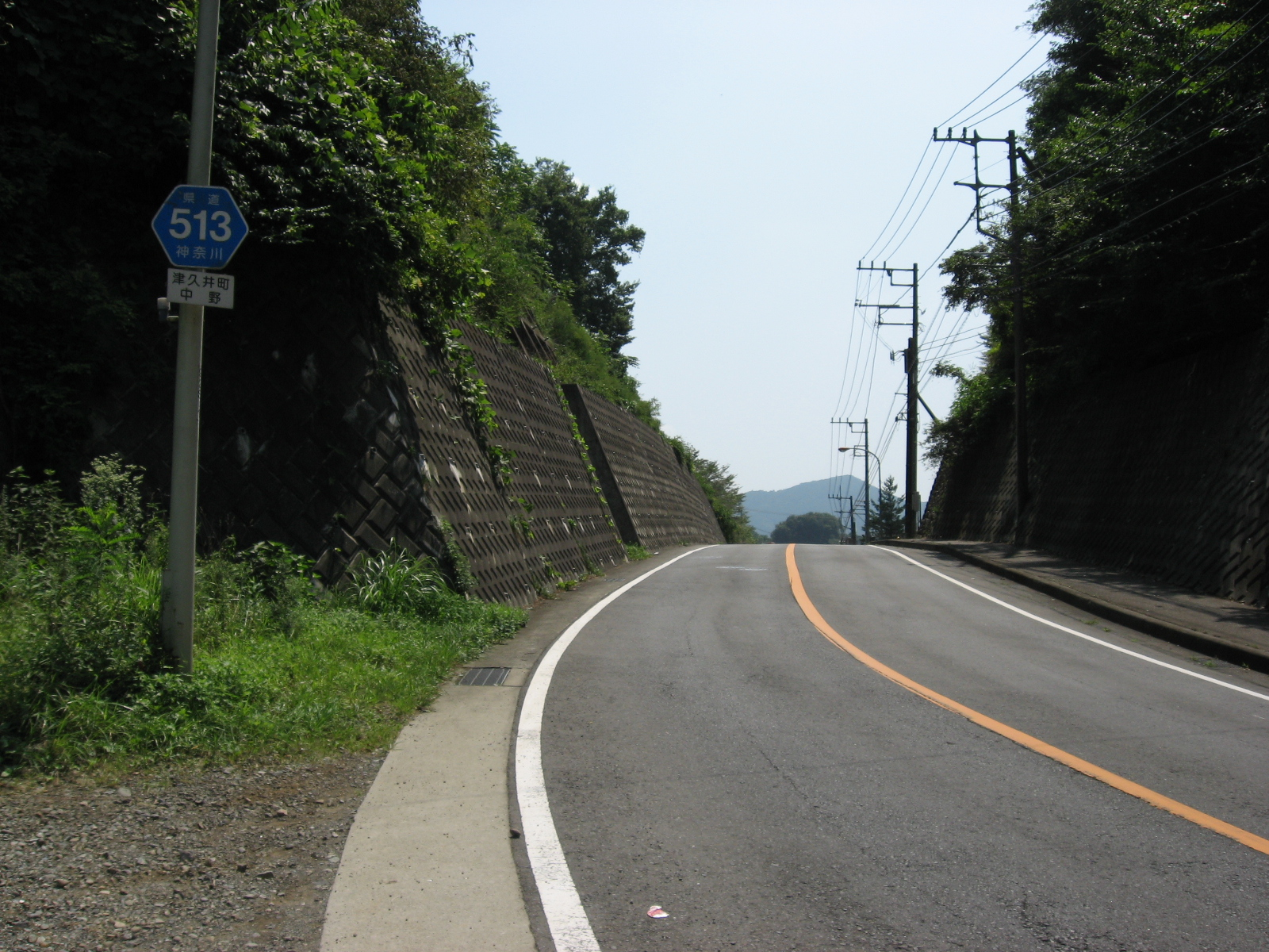 神奈川県道513号線